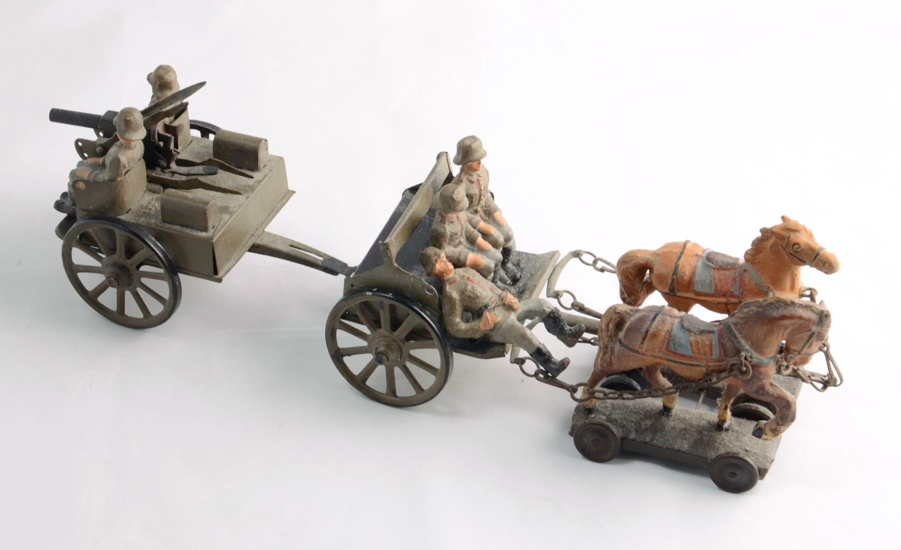 Heinrich Gotthold Schröder (vor 1880-1947) war Besitzer einer Druckerei und Herausgeber der Zeitung „Der Sächsische Grenzbote“ in Pausa. Die Zeitung war das lokale Nachrichtenblatt und erschien drei Mal pro Woche für Pausa und Umgebung. Schröder war als Soldat Reservist bei einem sächsischen Infanterie-Regiment, während des Krieges diente er an der Westfront und nahm an der Belagerung von Verdun teil. Von dort brachte er auch einen Rosenkranz mit nach Hause; ein recht ungewöhnliches Souvenir, da der Anteil von Katholiken in seiner Heimatgegend verhältnismäßig gering war. Ende 1917 war er wieder in Pausa. Der Bürgermeister des Ortes hatte ihn angefordert, da er für die Fortführung der Zeitung unabkömmlich war. Das Blatt brachte auch Extra-Ausgaben raus, u.a. zu den Kämpfen in Verdun oder zum Separatfrieden mit der Ukraine. Während seines Kriegsdienstes führten seine Ehefrau Marie und Schwägerin Frida Brachhold das Geschäft. Im Krieg wurde Schröder mit dem Eisernen Kreuz ausgezeichnet. 1933 wurde „Der Sächsische Grenzbote“ im Zuge der Gleichschaltungspolitik von den Nazis geschlossen. Später wurde die Zeitung 1945 von den Amerikanern wieder zugelassen und anschließend von den sowjetischen Truppen endgültig geschlossen. Trotz der Schließung der Zeitung lief die Druckerei weiter, selbst noch zu DDR-Zeiten, dann allerdings nicht mehr in Familienbesitz. Schröder hatte 1903 geheiratet und mit seiner Frau zwei Töchter und einen Sohn: Susanne (*1904), Dorothea (*1908) und Gottfried (*1914). Für seinen Sohn wurde das Militärspielzeug angeschafft. Es zeigt Soldaten auf einem Pferdewagen mit Kanonen. Geld für eine Erweiterung des Spielzeugs für weitere Figuren hatte die Familie nicht. Seine Tochter Susanne stickte zu Weihnachten 1916 die Dokumentenhülle mit der Auschrift „Gruss aus der Heimat!“ und der schwarz-weiß-roten Flagge des Deutschen Reichs.